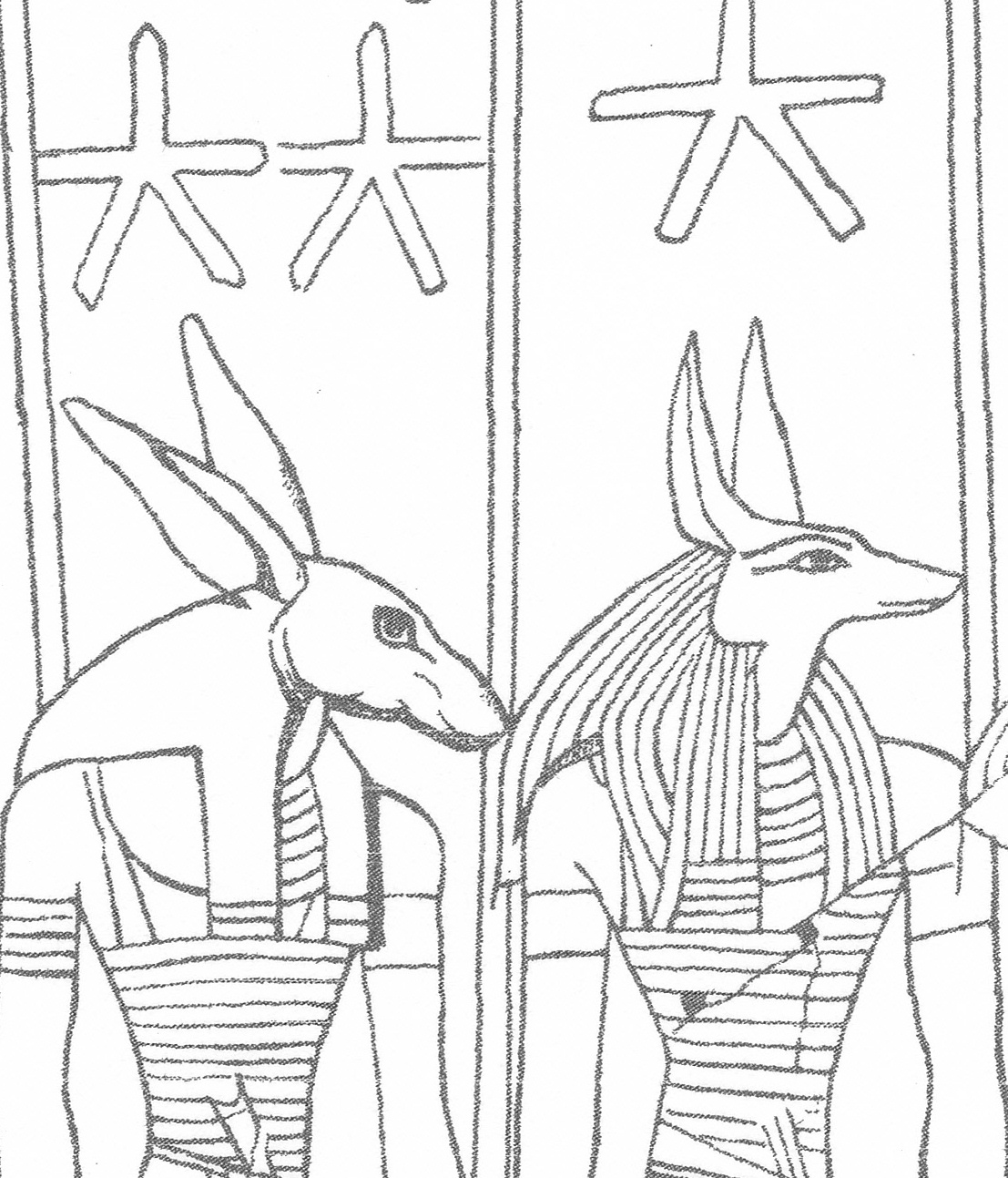 Têtes de Seth et d'Anubis, procession des décans du plafond astronomique du tombeau de Sethi Ier